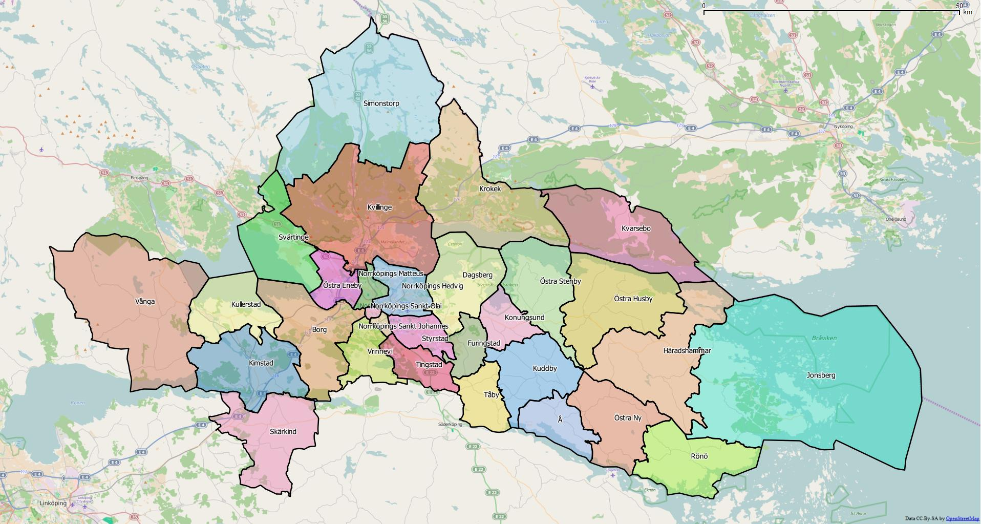 Distriktsindelningen i Norrköpings kommun World file: 100.05403068575567715 0 0 -100.05403068575567715 1728916.89780188770964742 8152098.92822960950434208